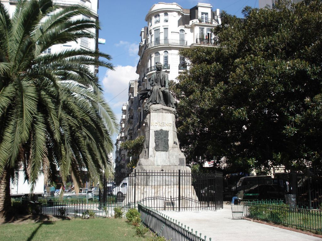 Monumento a Mariano Moreno en la Ciudad de Buenos Aires, Argentina. On the Plaza Mariano Moreno, inaugurated 1910-10-01,[1] sculptor: Miguel Blay y Fábregas (1866-1936)